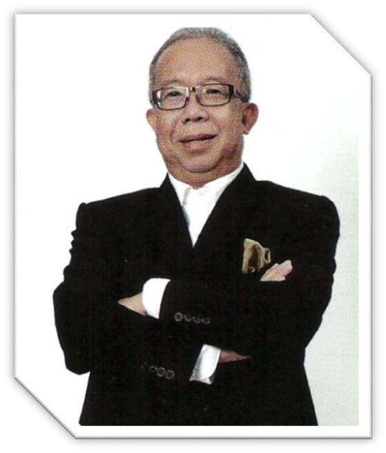 Foto Dato' Anuar Othman